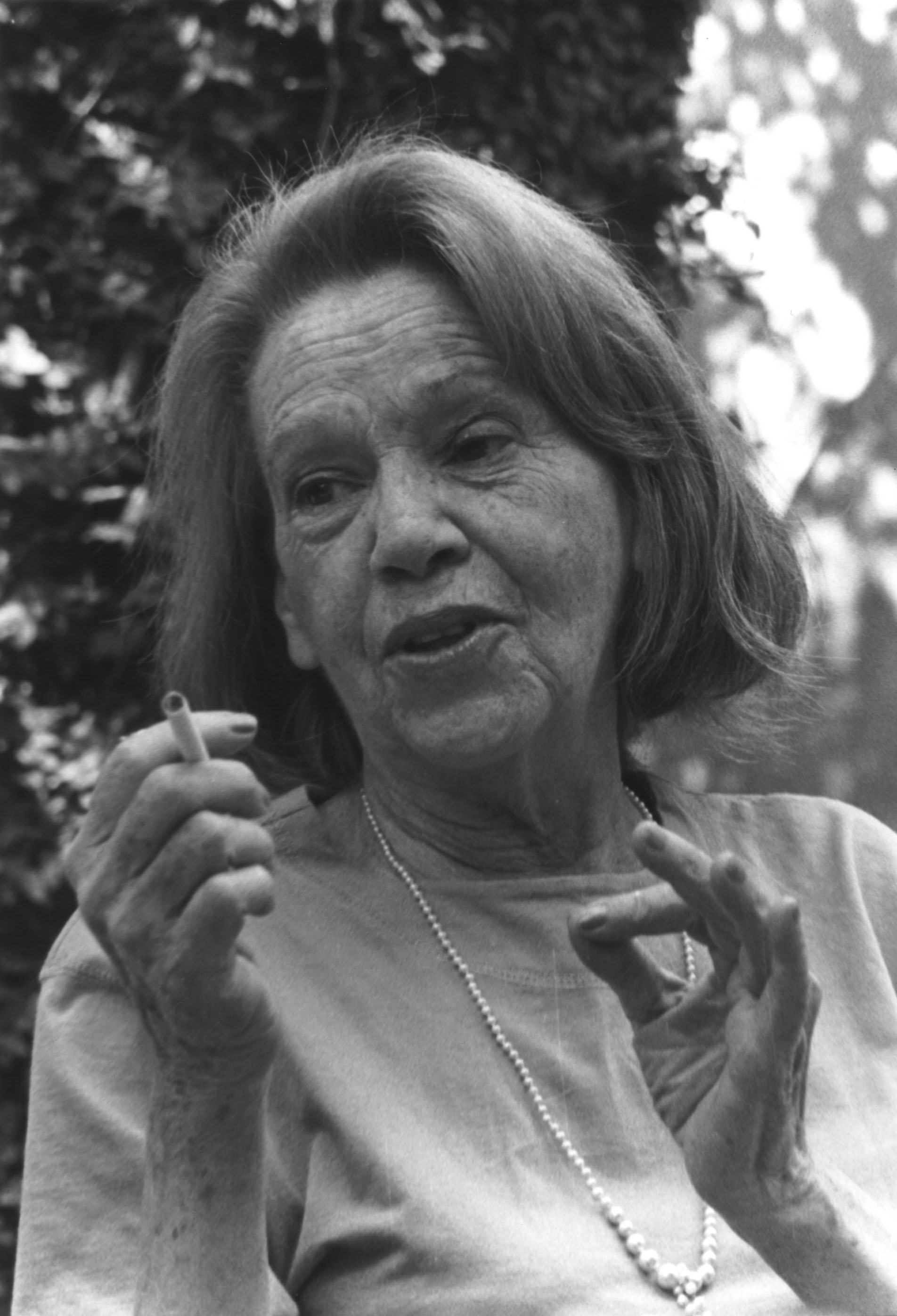 Retrato